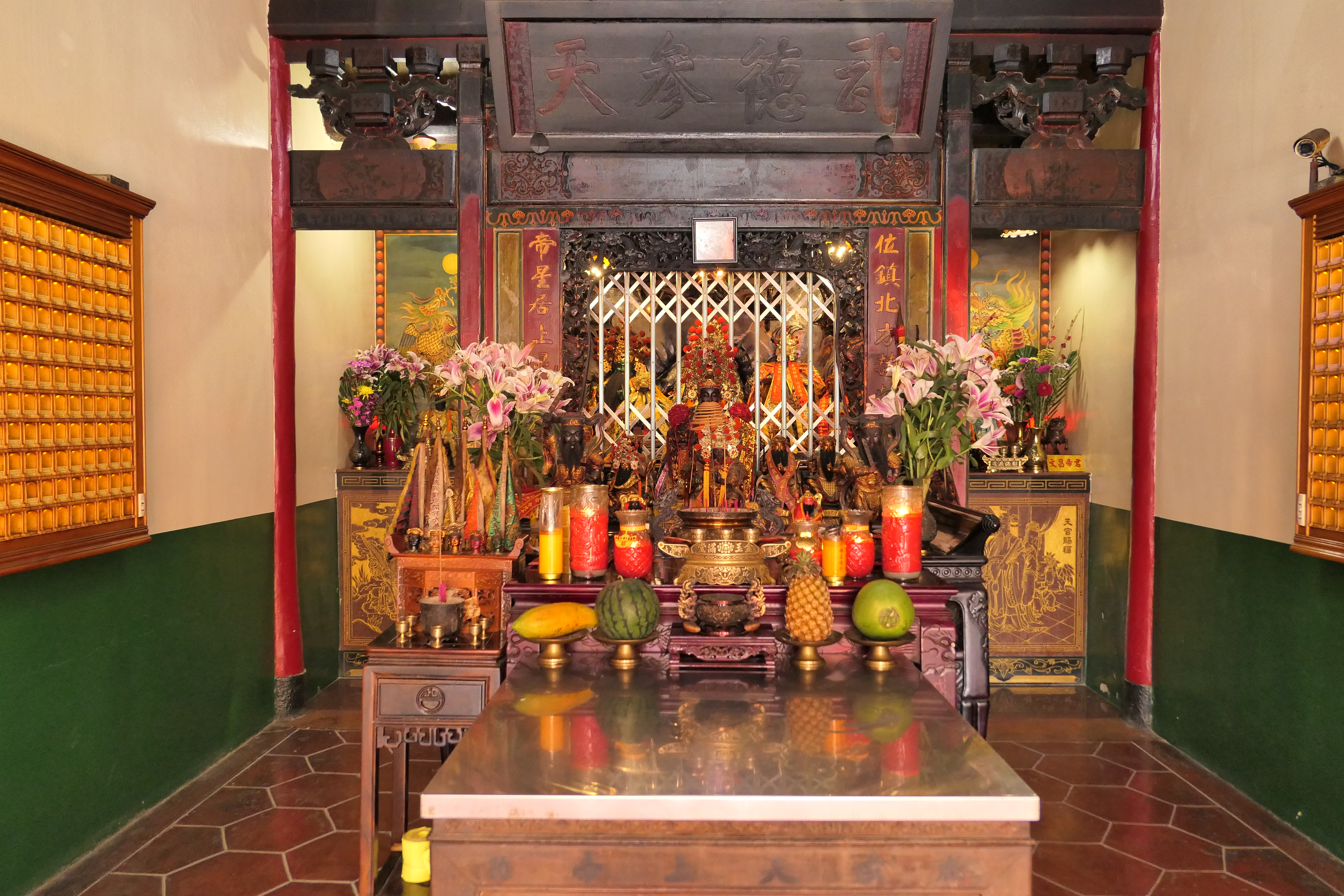 鹿陶開基北極殿內景